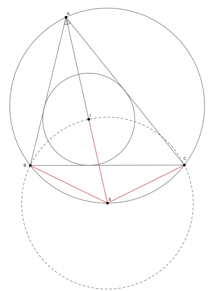 סרטוט של משפט התלתן בשימוש בתוכנת ג'אוג'ברה